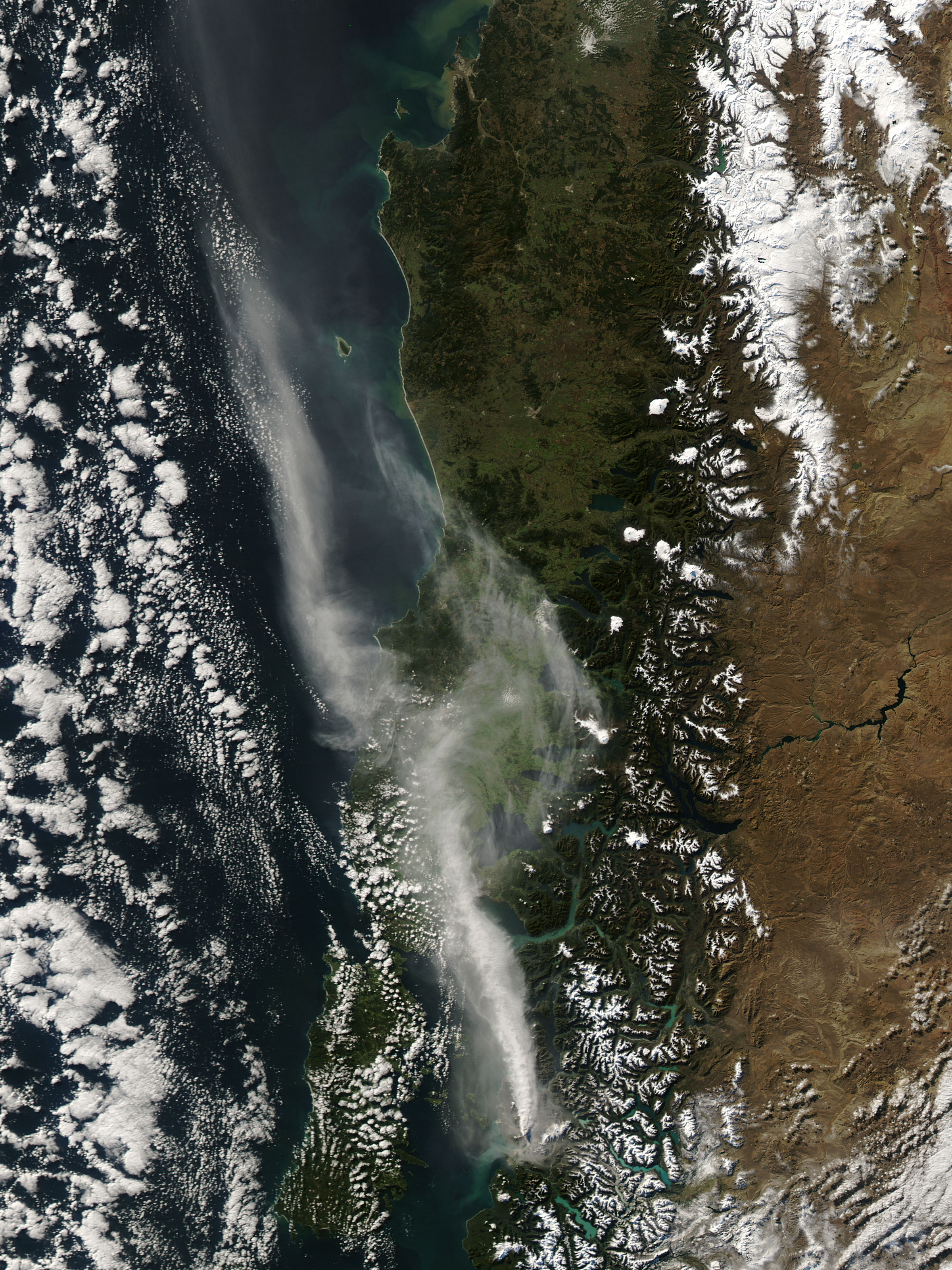 Imagen satelital de la pluma de cenizas del volcán Chaitén, con orientación norte, capturada por el satélite Aqua el 28 de mayo de 2008